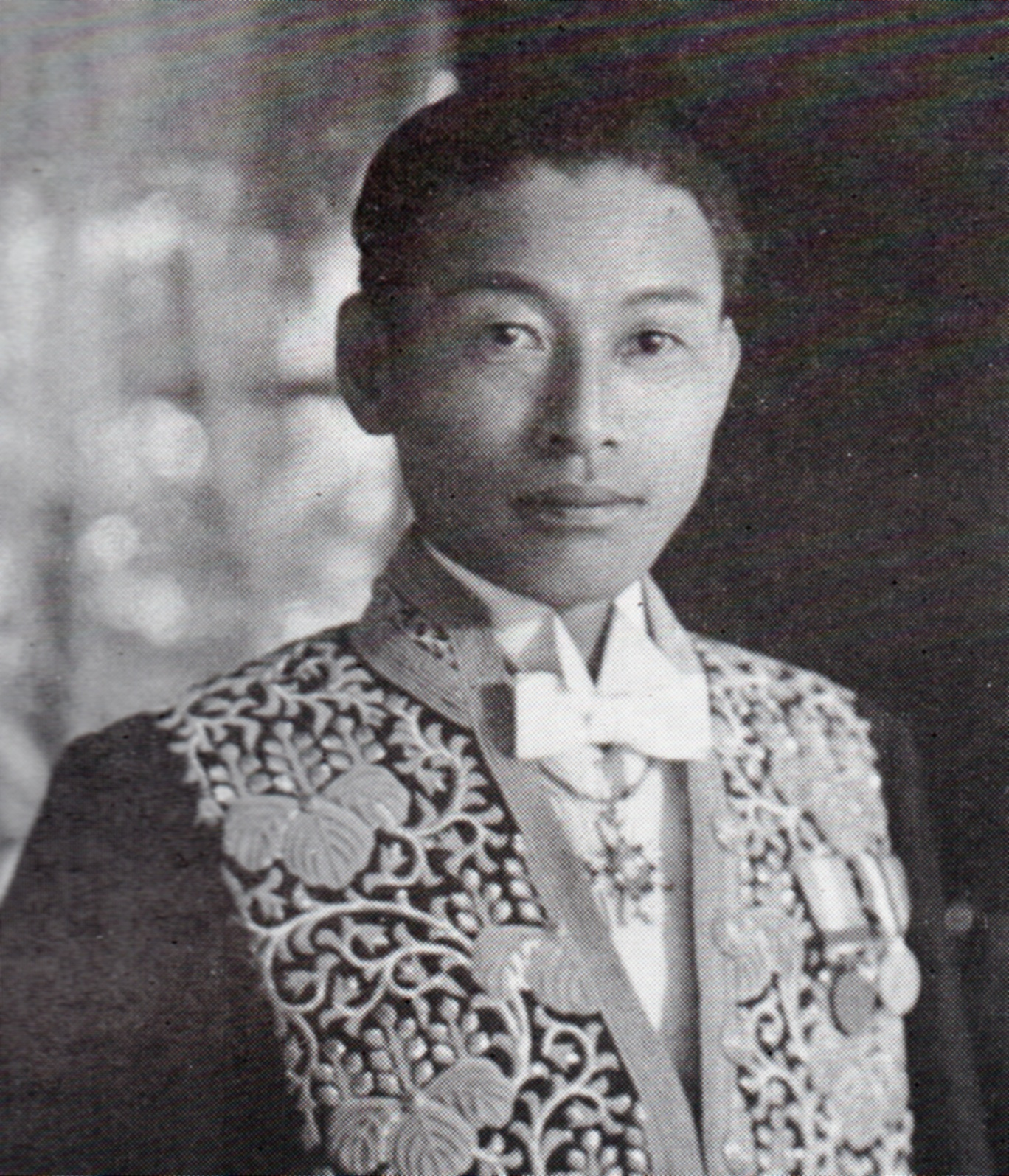 鷹部屋福平（1893 - 1975）